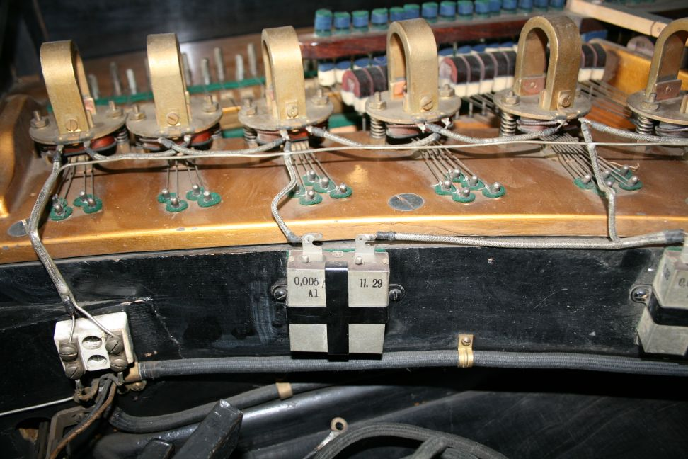 Tonabnehmer eines Neo Petrof Flügels